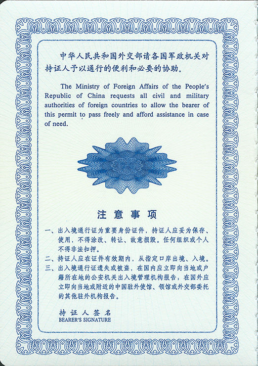 中華人民共和國多次出入境有效出入境通行證的注意事項